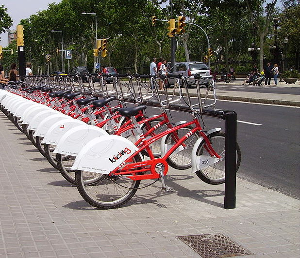 Estació de Bicing a Barcelona, Catalunya.